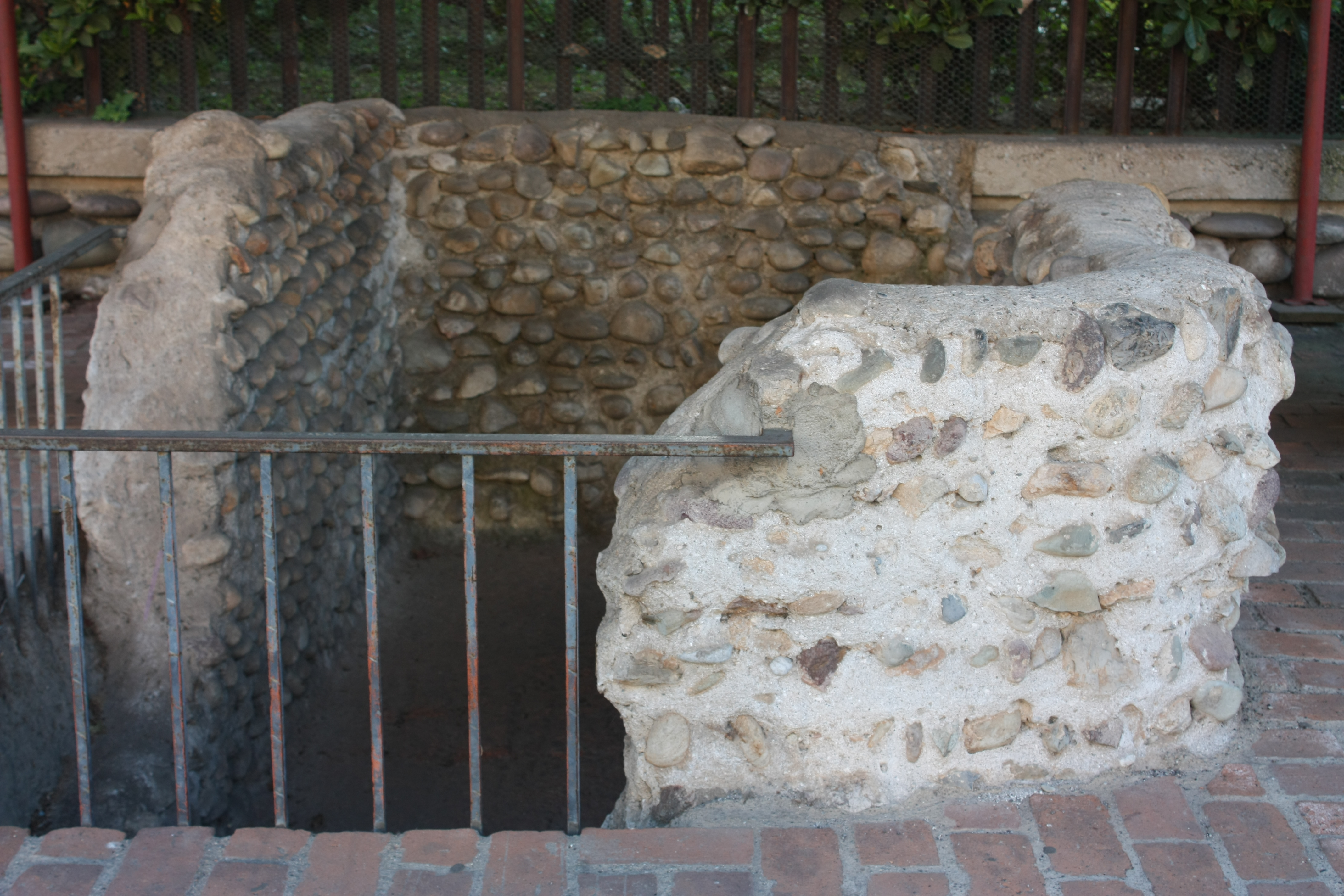 Cisterna romana rinvenuta in zona paderno a Seriate